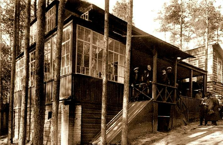 Дом в Озерках, в котором 28 марта 1906 года был убит бывший священник Георгий Гапон.